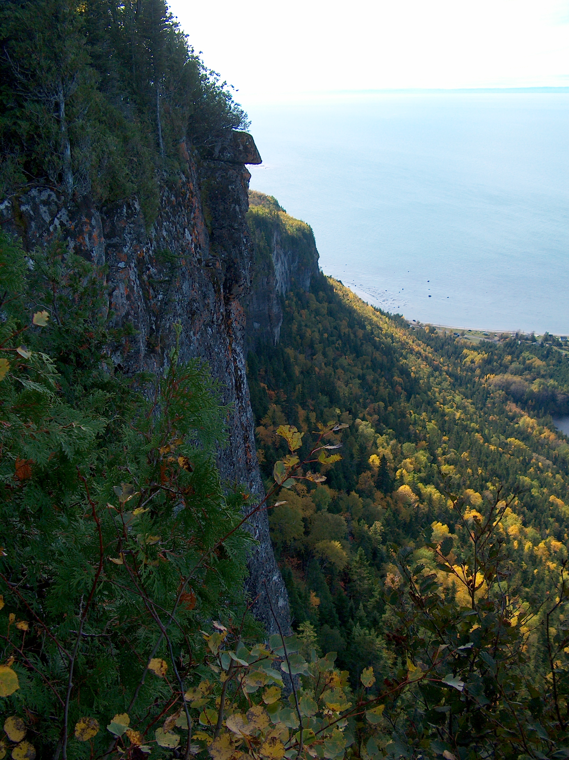 Photo des murailles à partir du belvédère du Pic Champlain. Auteur: Pascal Thériault-Lauzier Date: Octobre 2005